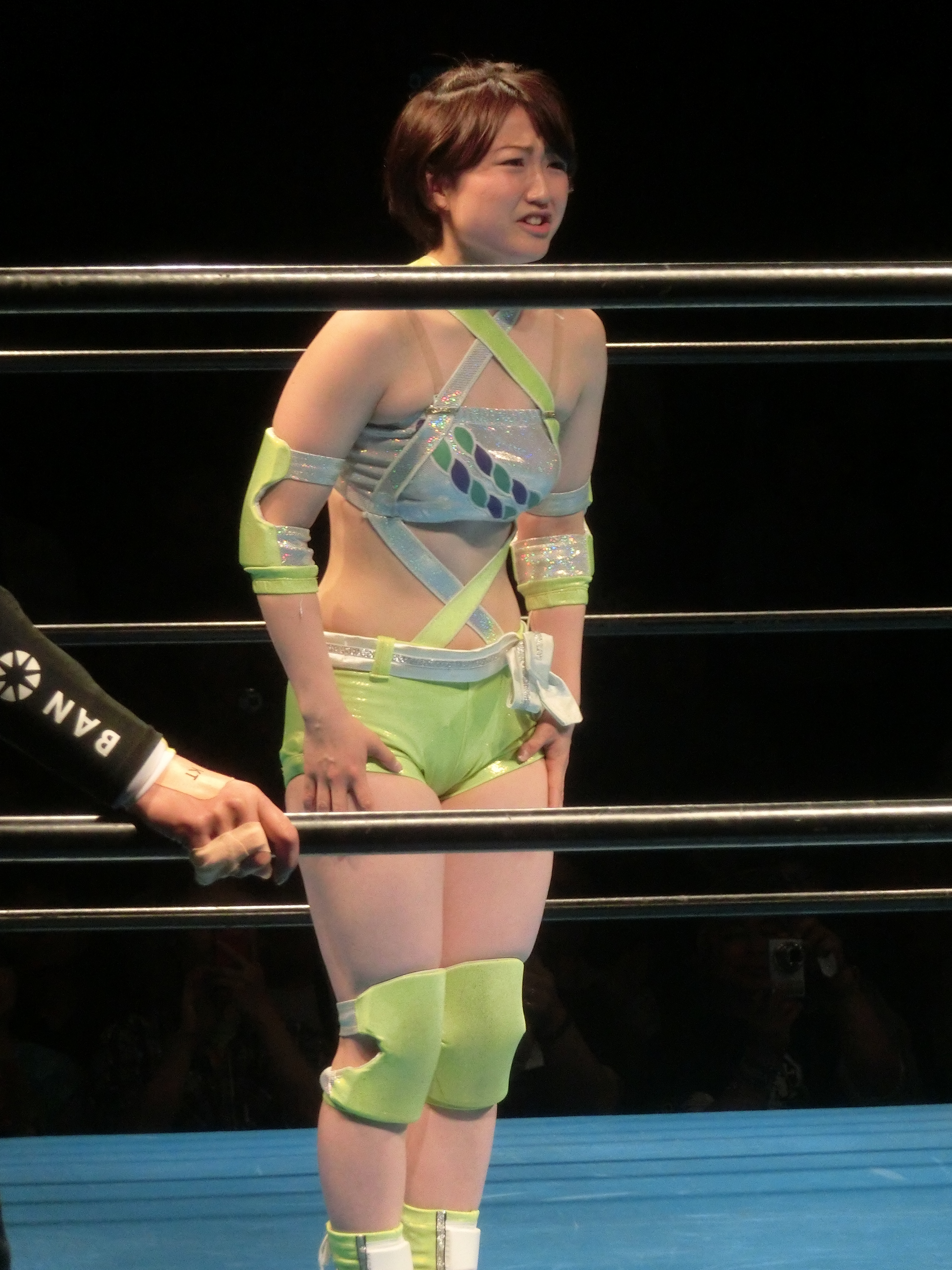 カラーズ新木場2019年5月